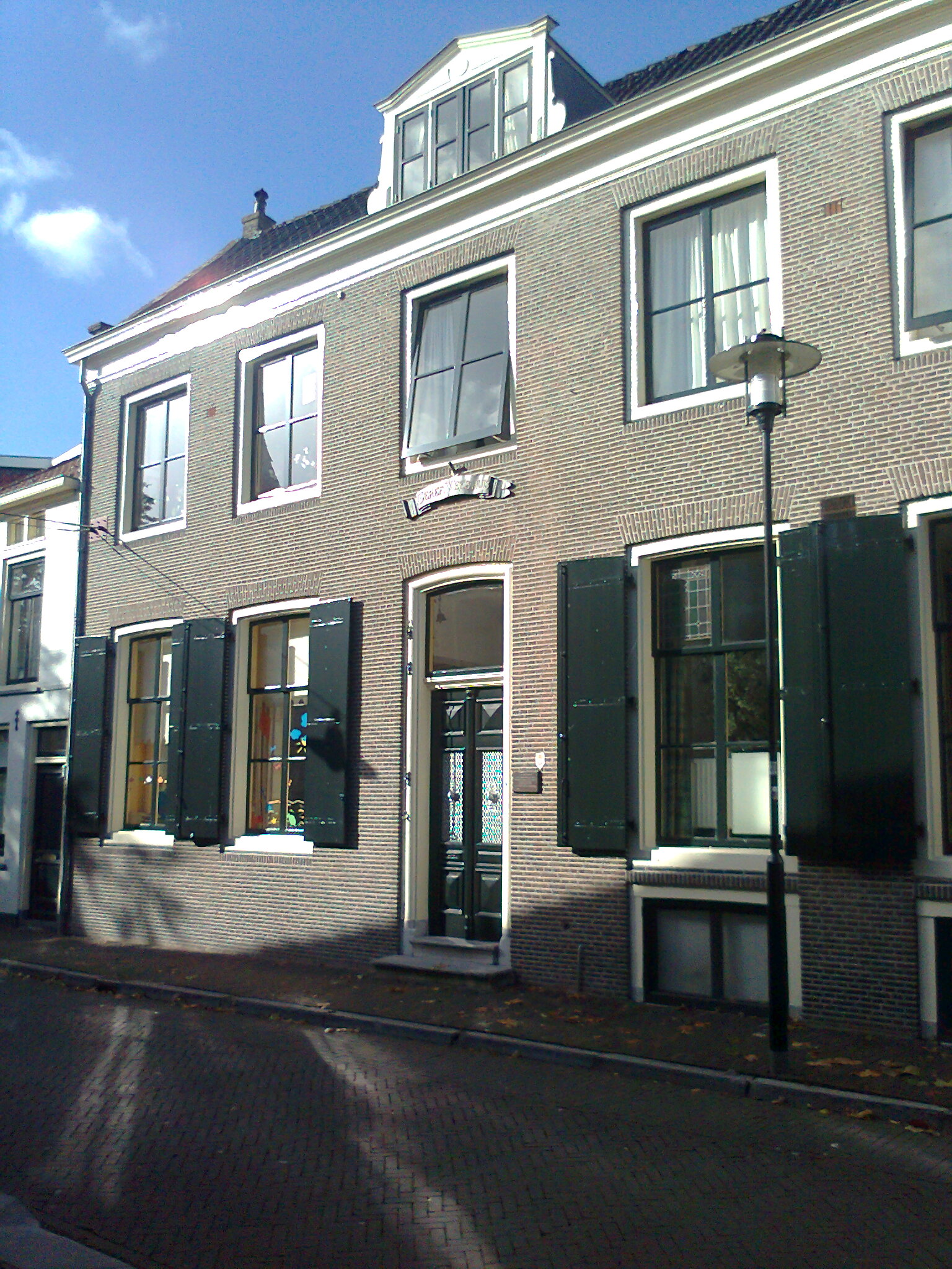 Voormalige Gereformeerd Weeshuis, Havenstraat 6, Woerden, Nederland